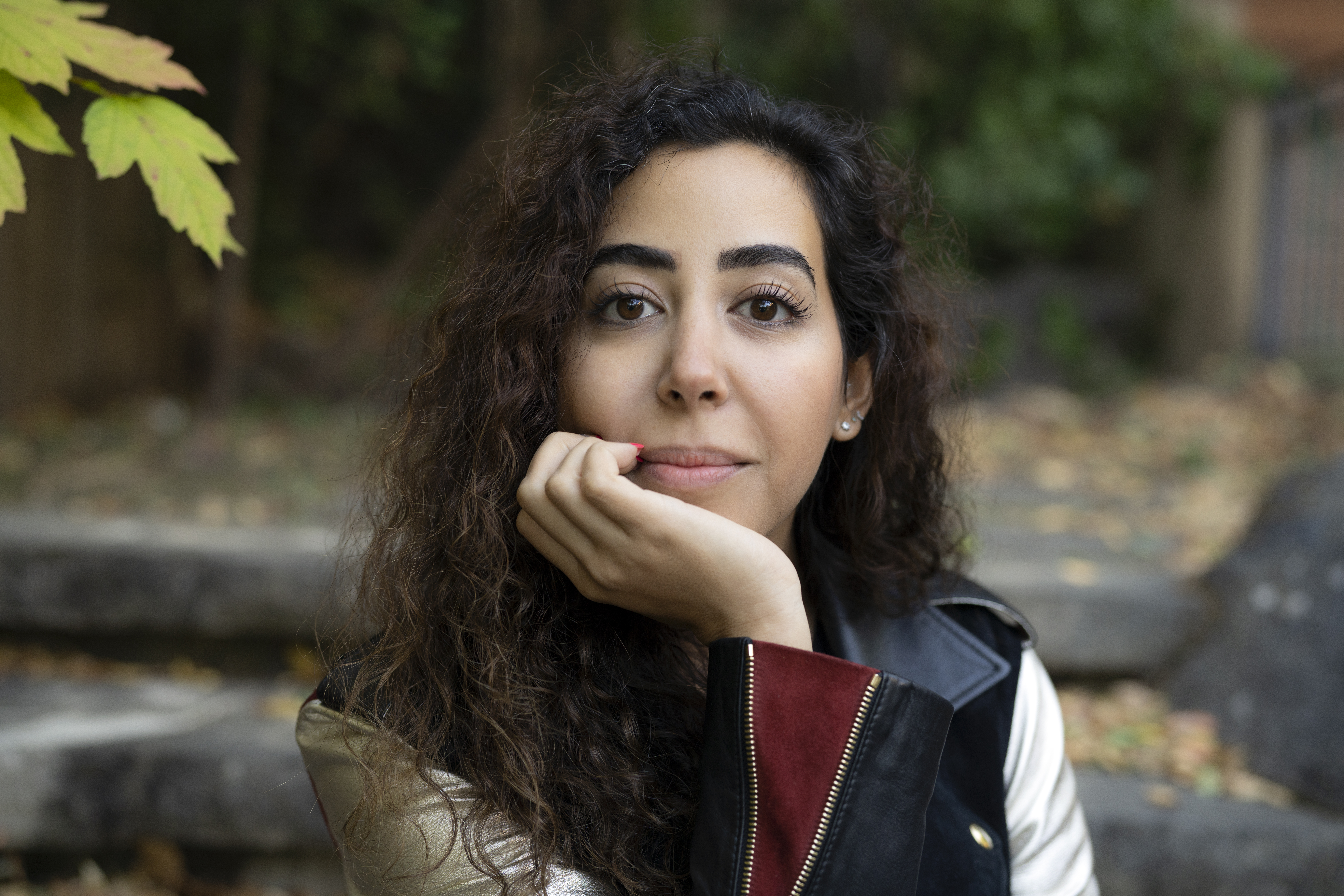 Tasneem Alsultan in 2019.